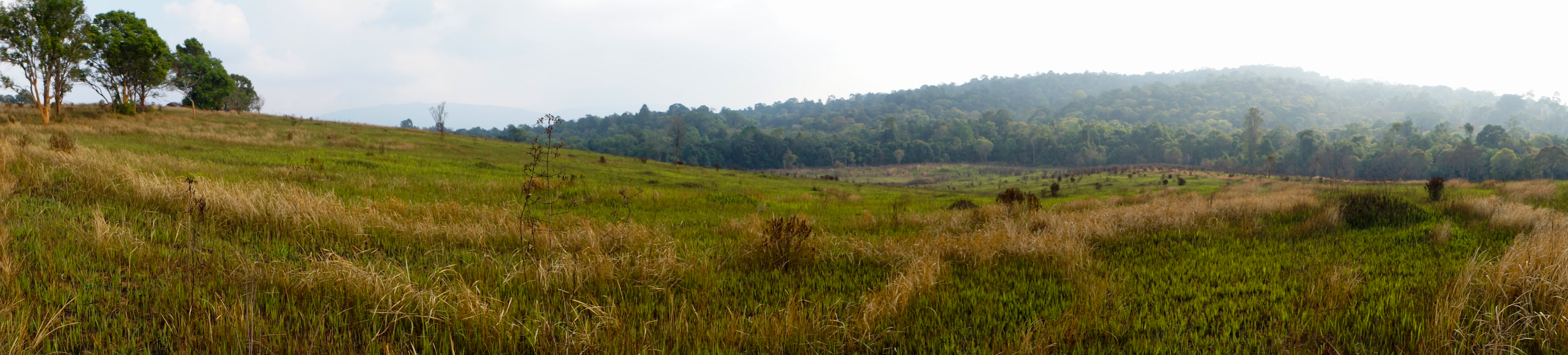 Phak Chi grassland at Khao Yai national park